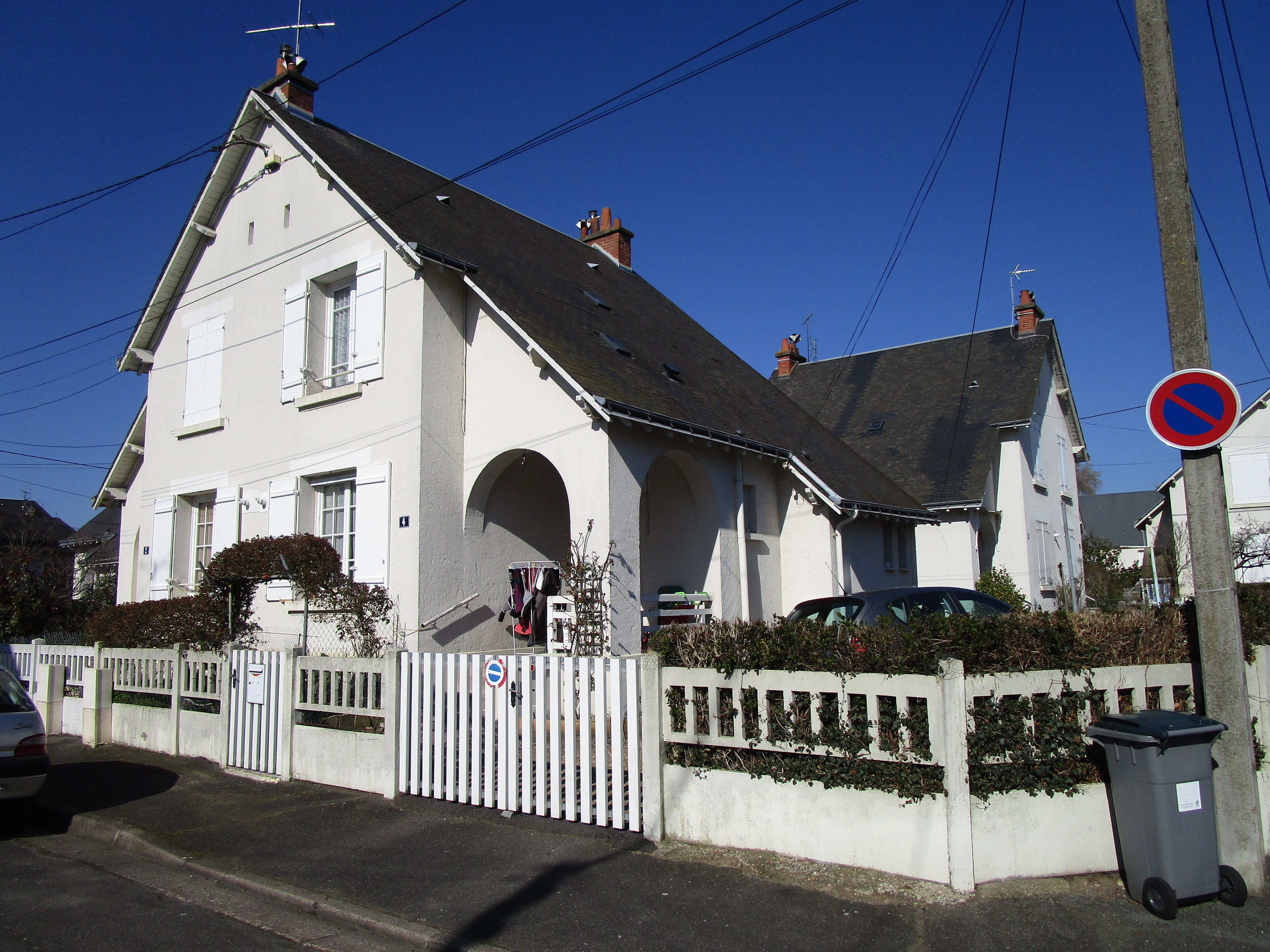 Maison de la cité Jolivet, quartier La Fuye-Velpeau, à Tours